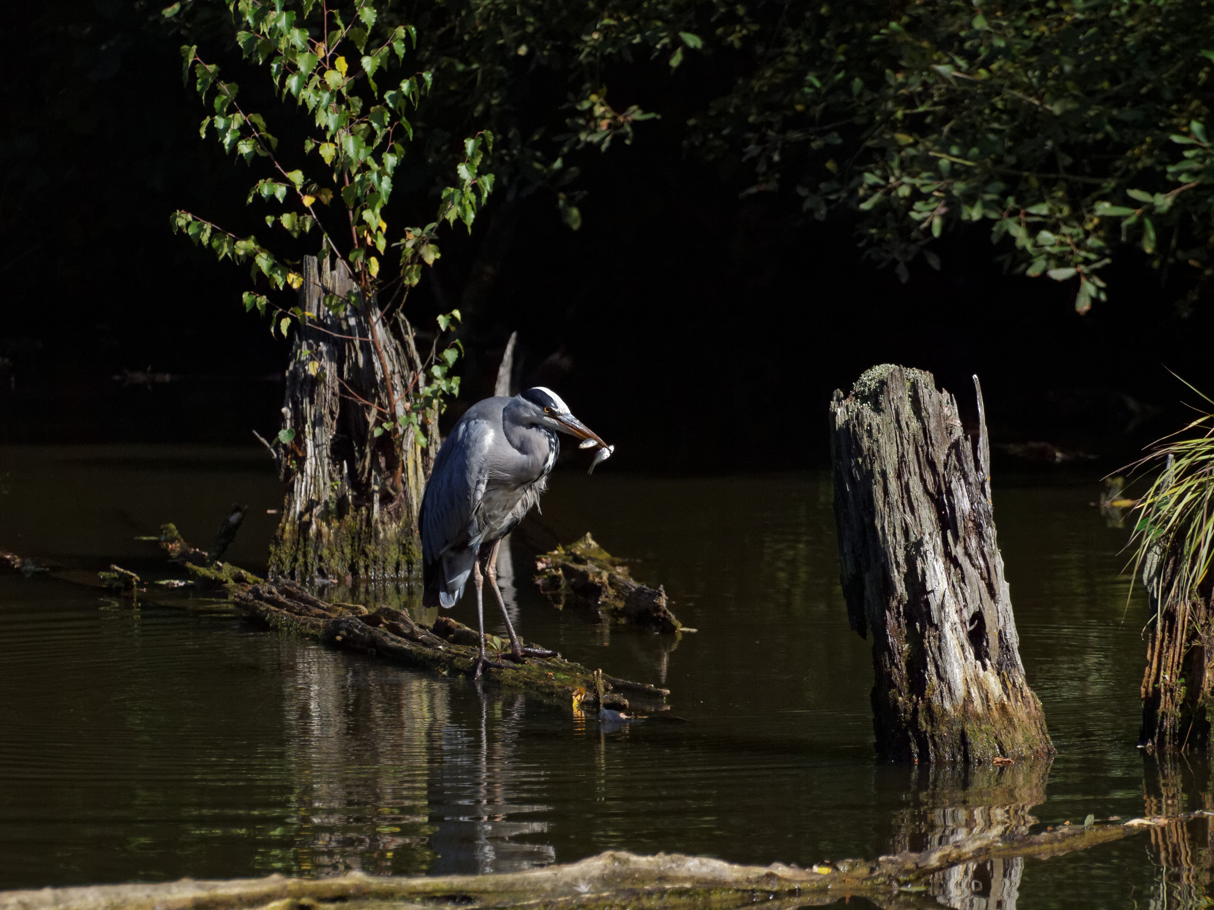 Graureiher mit zwei Fischen im Schnabel im Landschaftsschutzgebiet Grünzug östlich Friedrich der Große-Storchenwiese in Herne-Sodingen, LSG-4409-0030. CDDA-Code:555561071